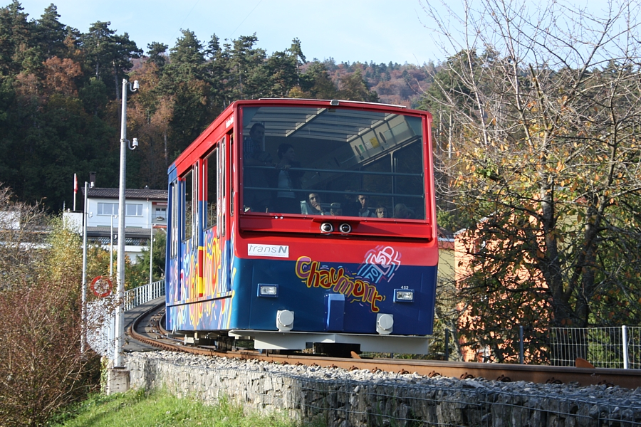 Funiculaire de Chaumont (Neuchâtel) arrivant à la station inférieure de La Coudre - 26 octobre 2013